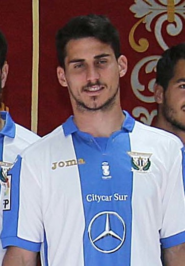 Felicidades pepineros!! Vuestro ascenso a Primera es la historia de un sueño, el resultado de vuestro trabajo y esfuerzo. Sois un orgullo para todo Madrid! Enhorabuena CD Leganés. #LeganésEsDePrimera